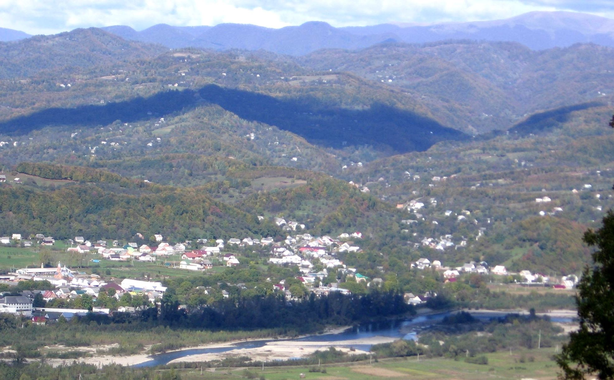 село Вільхівці (Тячівський район)